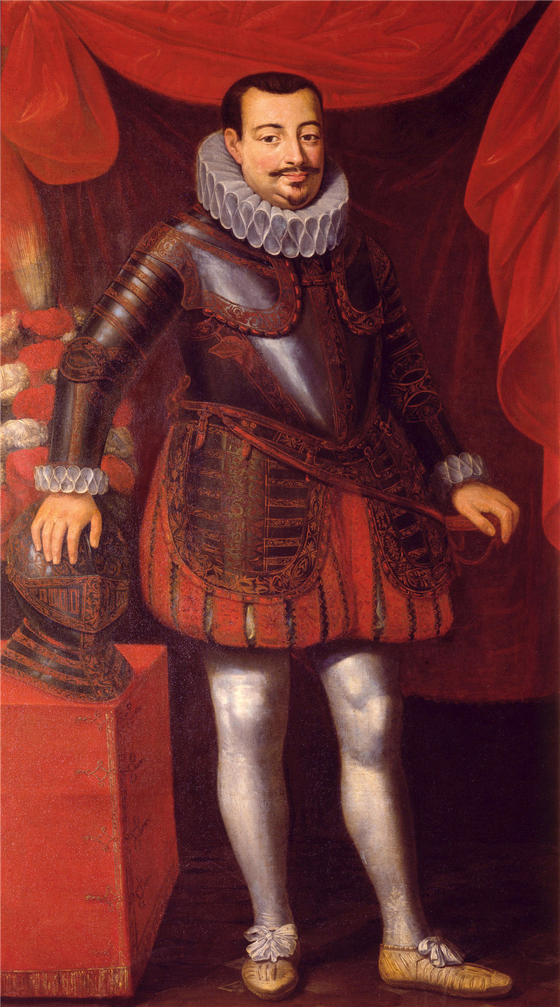 Charles II Grimaldi, seigneur de Monaco